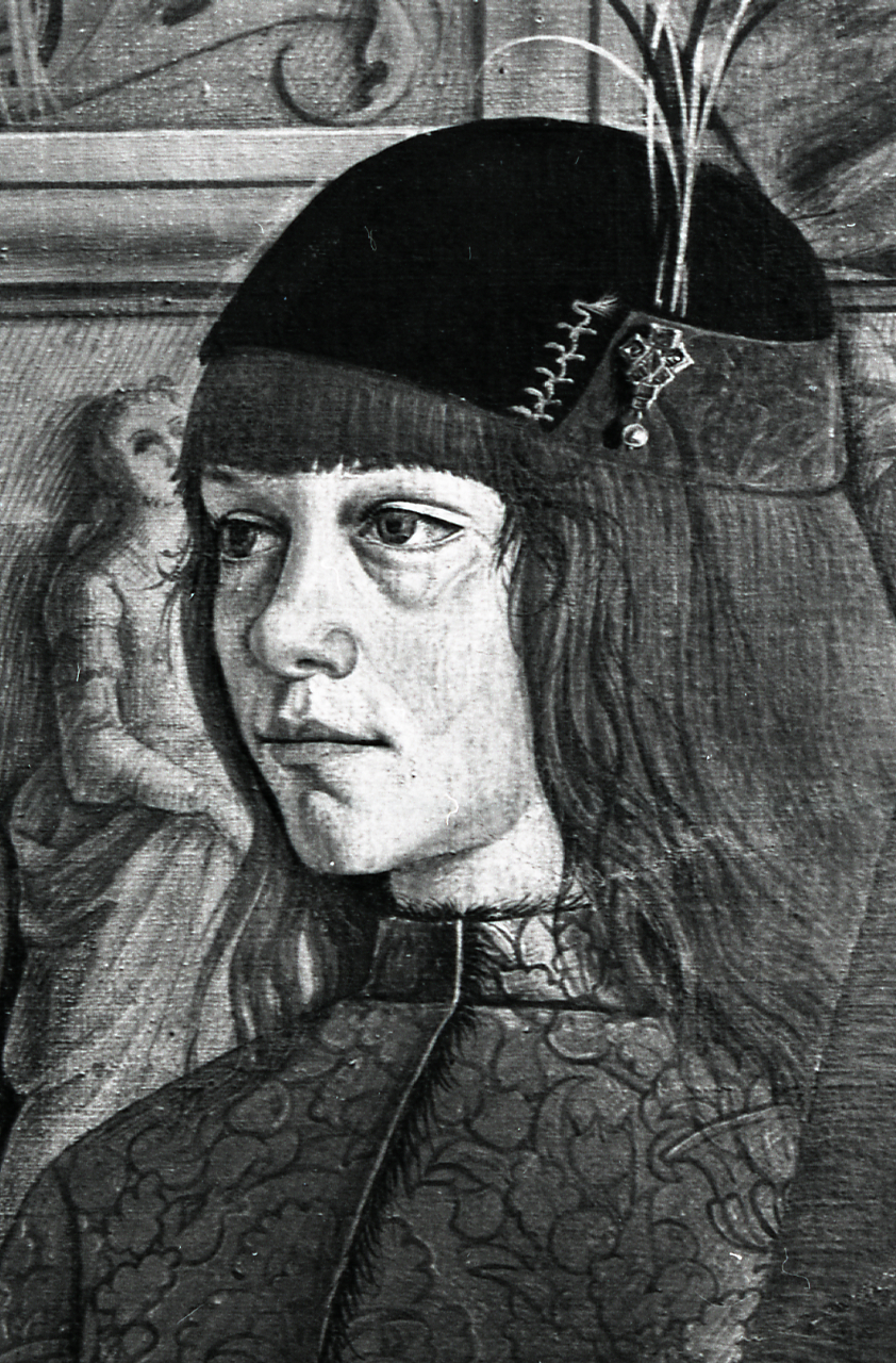 Servizio fotografico : Bologna, 1982 / Paolo Monti. - Strisce: 1, Fotogrammi complessivi: 6 : Negativo b/n, gelatina bromuro d'argento/ pellicola ; 35 mm. - ((Sul portanegativi: N[I]K[MA]T FP4. - Occasione: Documentazione della mostra realizzata per il restauro dei dipinti. - Fonte: Agenda di Paolo Monti: Nikon Leika 3001-/ Monti 1978 (1978-1982), presso Archivio Paolo Monti. - Fonte: Fattura di Paolo Monti: IV. Commesse/ Fattura n. 12/ Fotografie di quadri e affreschi restaurati (1982/06/29), presso Archivio Paolo Monti